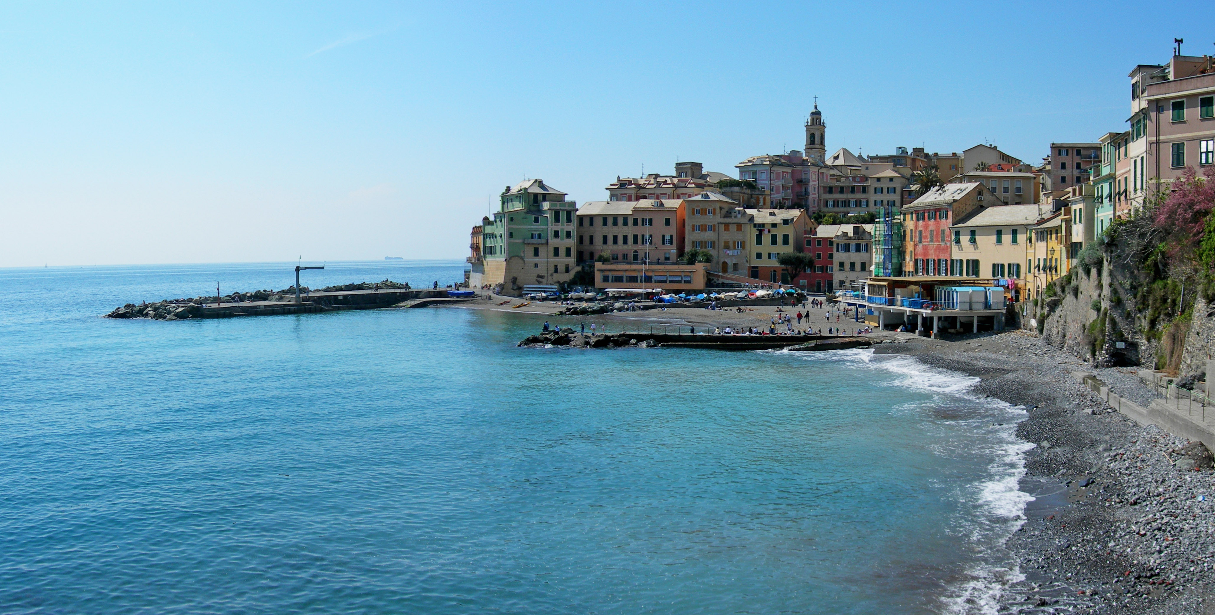 Panorama di Bogliasco (GE)